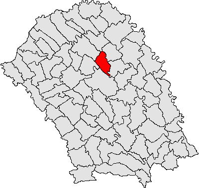 Categorie:Hărţi ale judeţului Botoşani